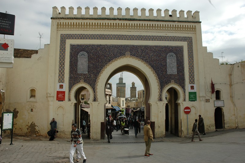 Fes - Bab Bou Jeloud